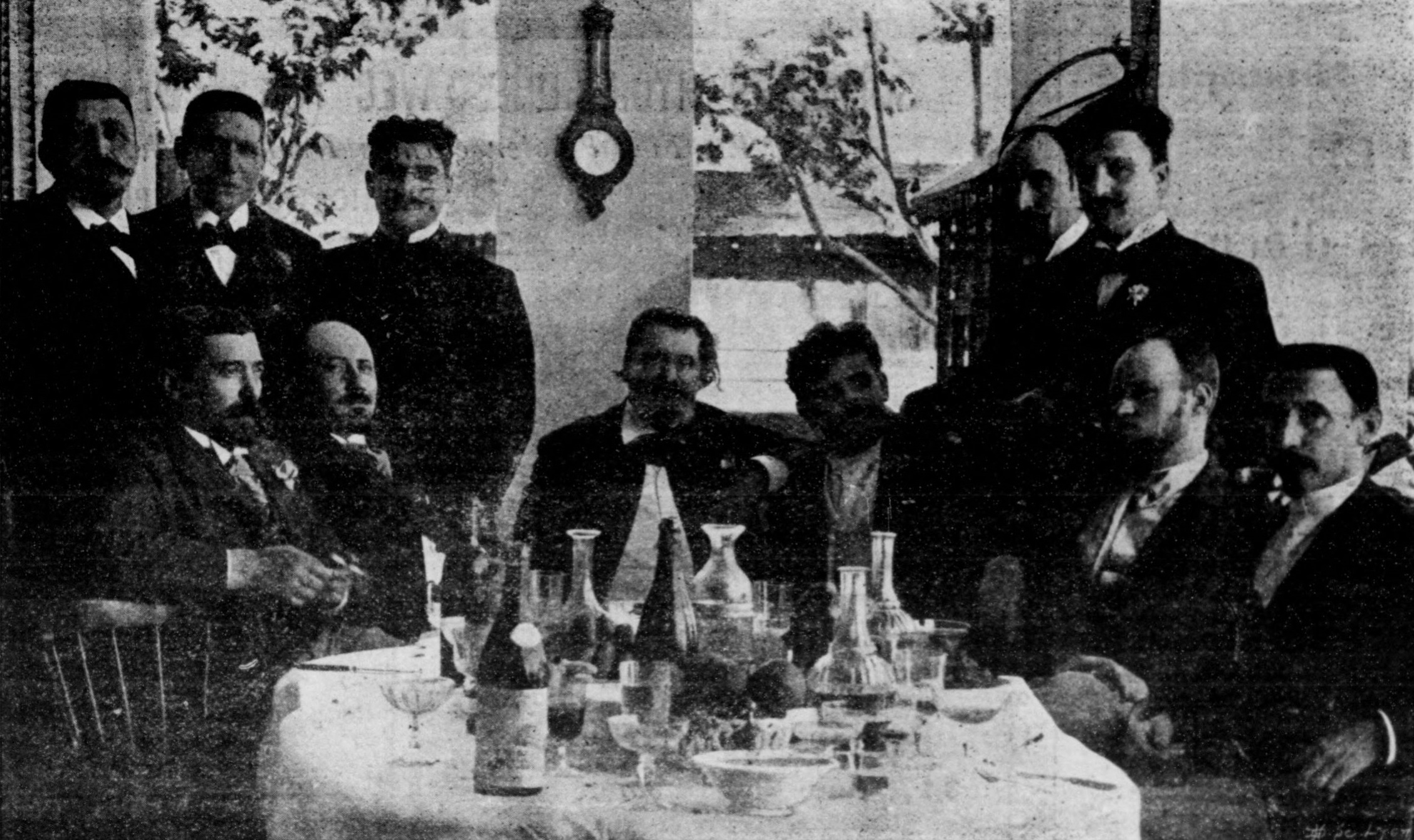 "Drumont et ses amis" au Vélo-Cottage de Mustapha, le jour des élections municipales.